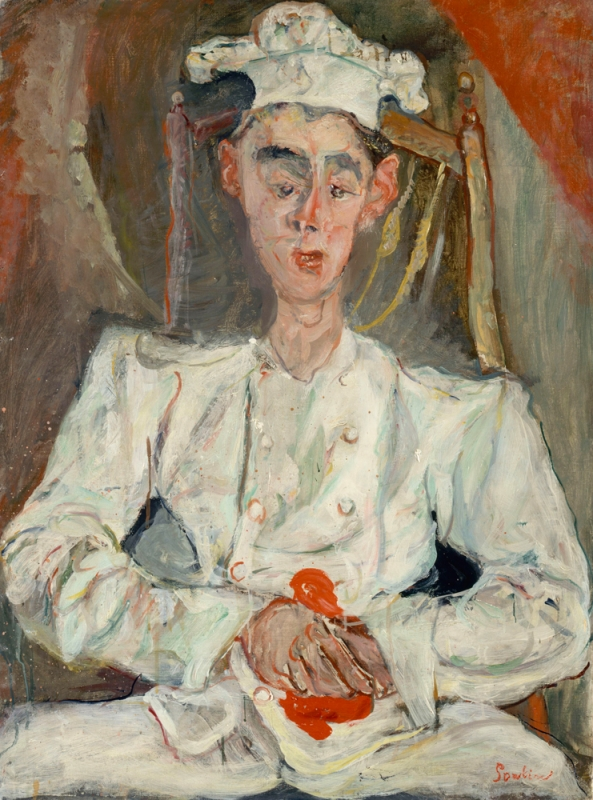 Chaïm Soutine (1893 - 1943), "Le Petit Pâtissier", huile sur toile, 73 x 54 cm, Musée de l'Orangerie, Paris